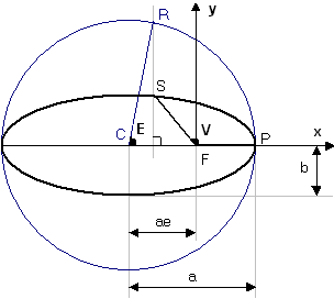 Diagrama para explicar la ecuación de Kepler Creada por el autor a partir de imagen Kepler-equation-derivation.png de la wikipedia inglesa.